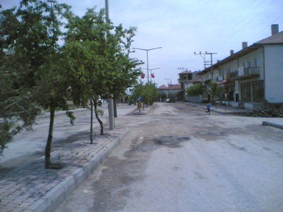 Abuuşağı Kasabası, Gülşehir, Nevşehir Burak Öz' e aittir.